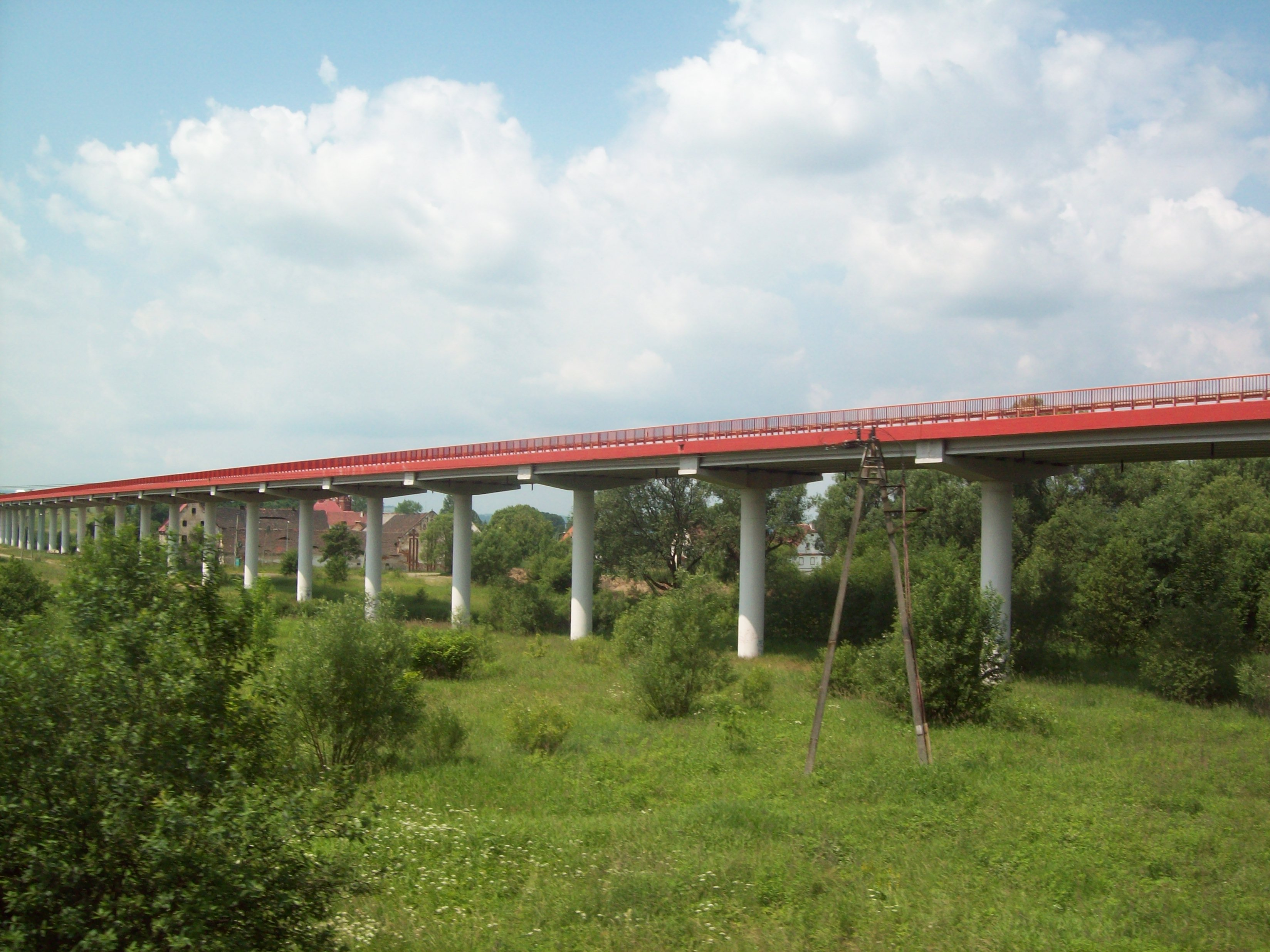 Estakada Doliny Nysy Kłodzkiej na kłodzkim Ustroniu